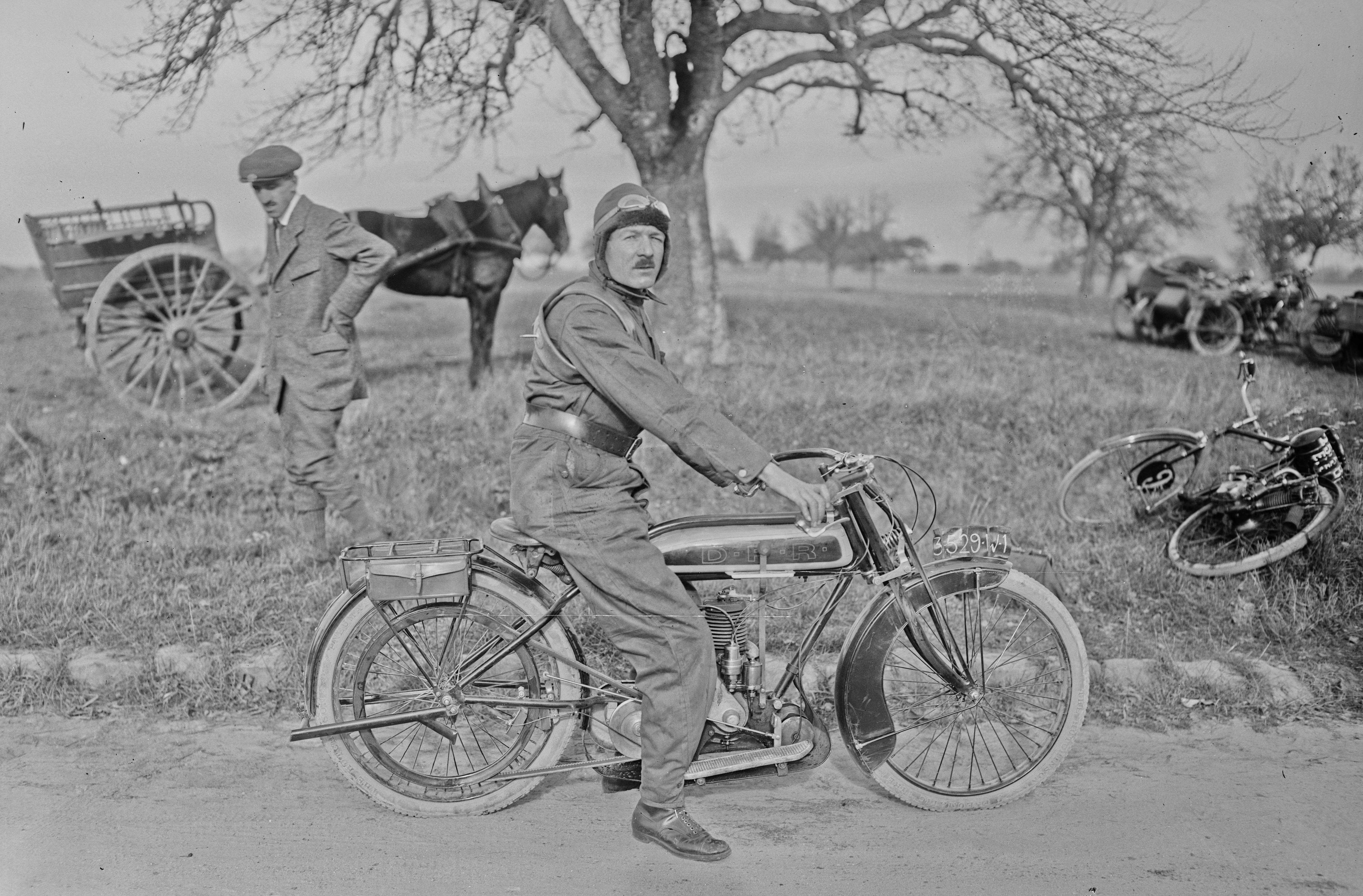 Gometz[-le-Châtel], 31/10/20, Cauchemez sur motocyclette DFR.